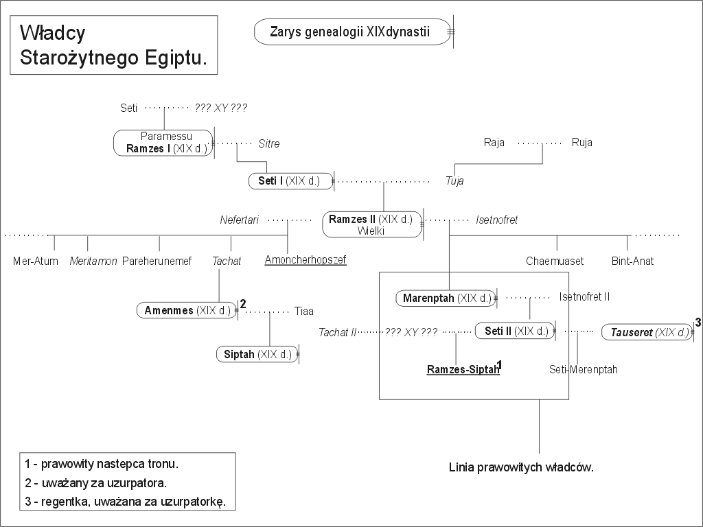 Starożytny Egipt - genealogia XIX dynastii. Kategoria:Drzewa genealogiczne